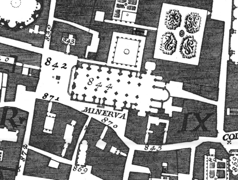 Pianta di Nolli 1748